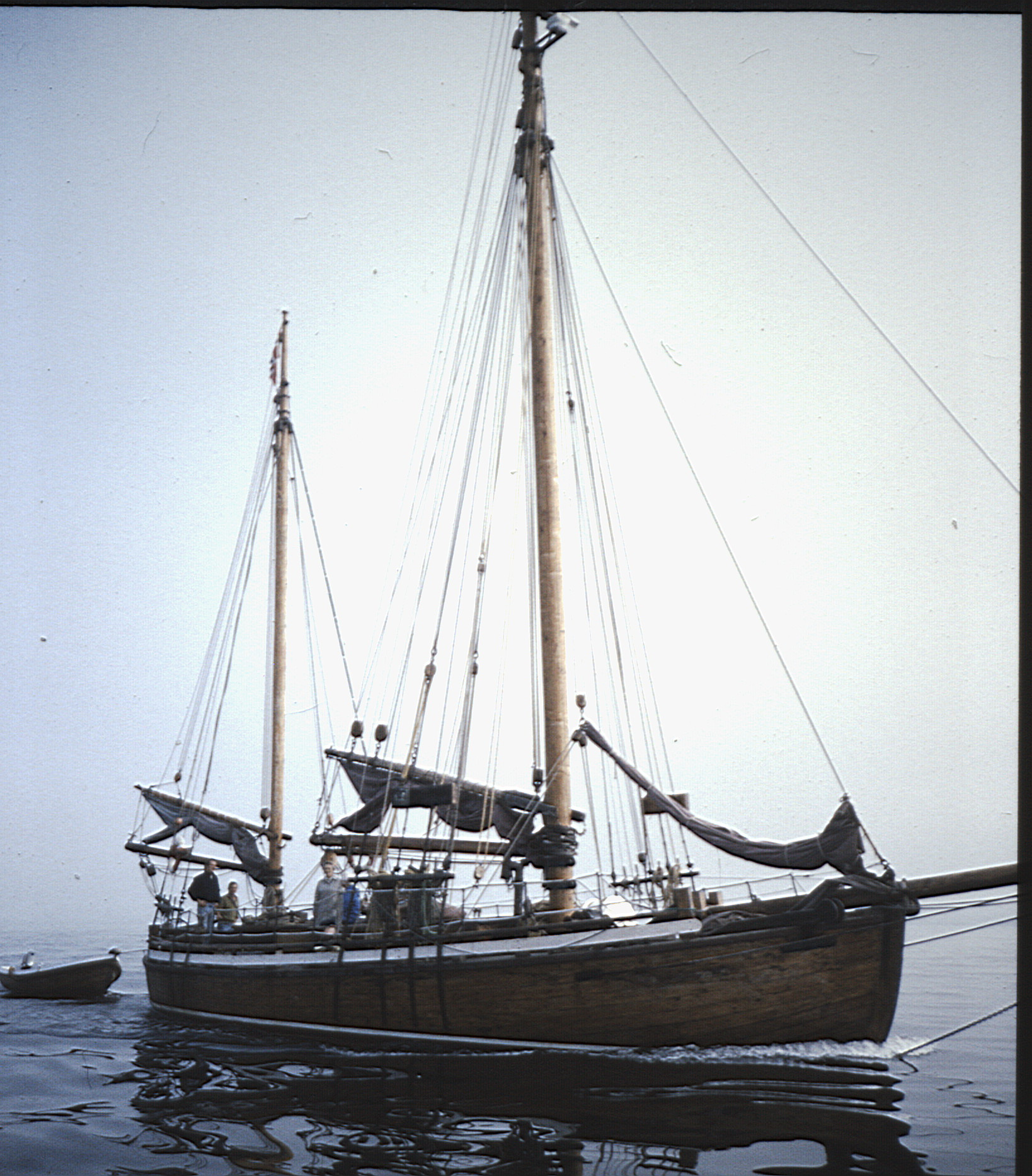 nn: MS «Framstig»